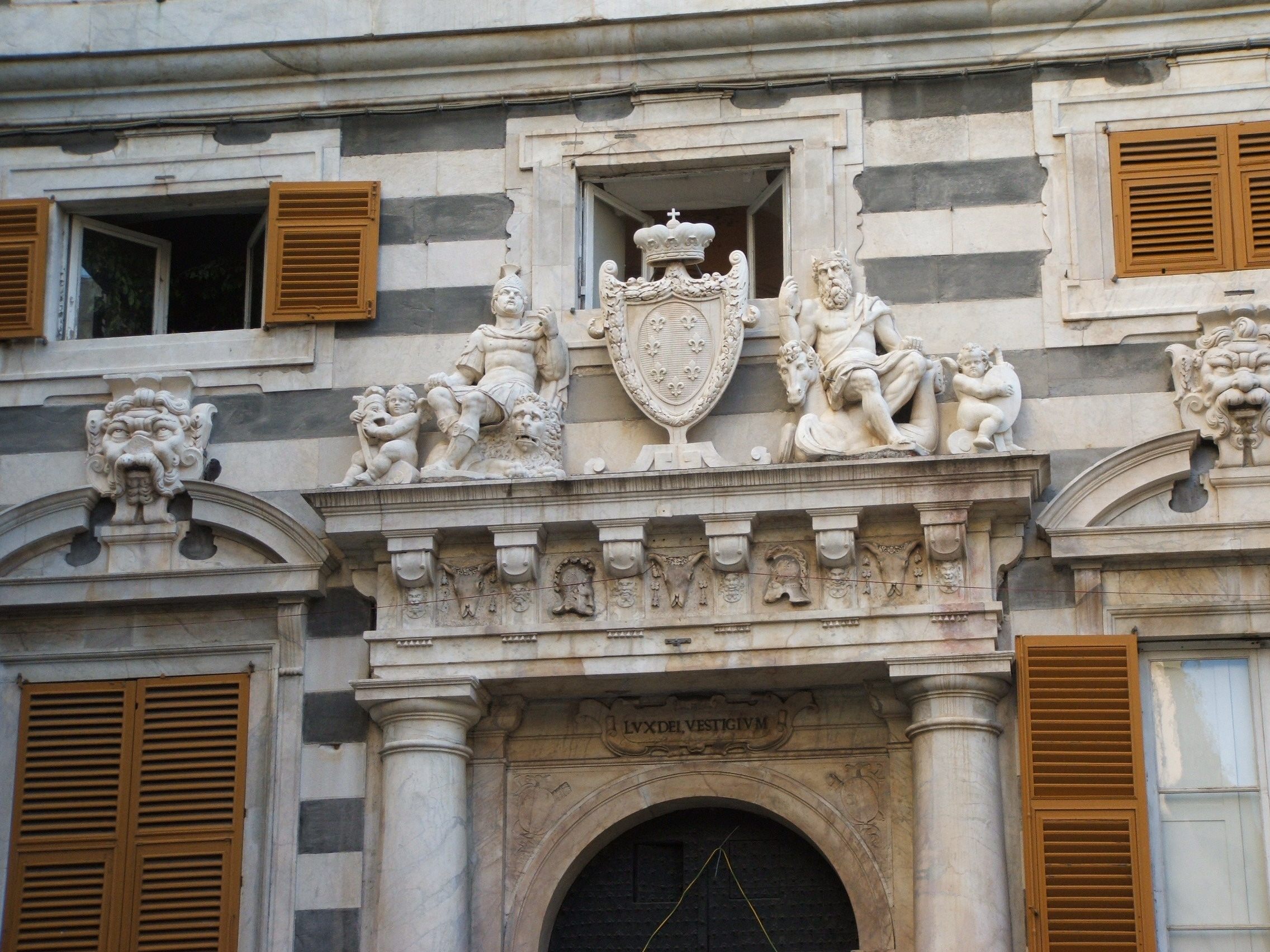 Genova, Stemma gentilizio, affiancato dalle statue di Marte (dio della guerra) e Nettuno (dio del mare), simboleggianti la virtù guerriera per terra e per mare. Via e piazza San Lorenzo. Lo stemma potrebbe essere forse quello dei De Ferrari (si veda per un confronto [1] che cita il loro stemma con sette gigli d'oro).